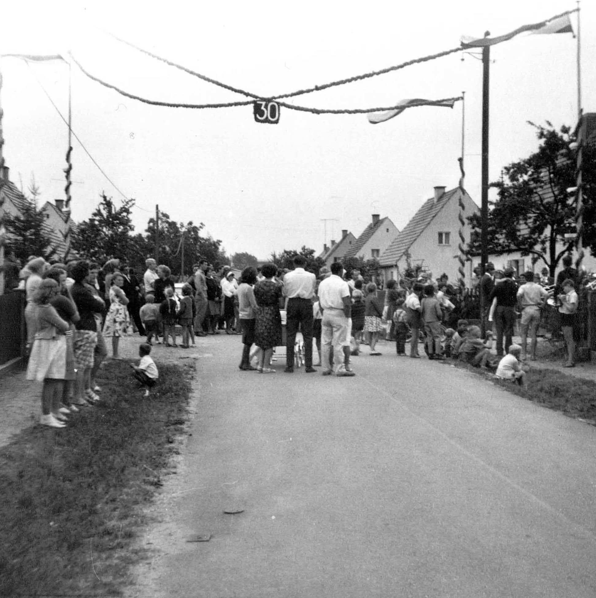 Straßenansicht am Siedlerfest zum 30-jährigen Jubiläum im Jahre 1963